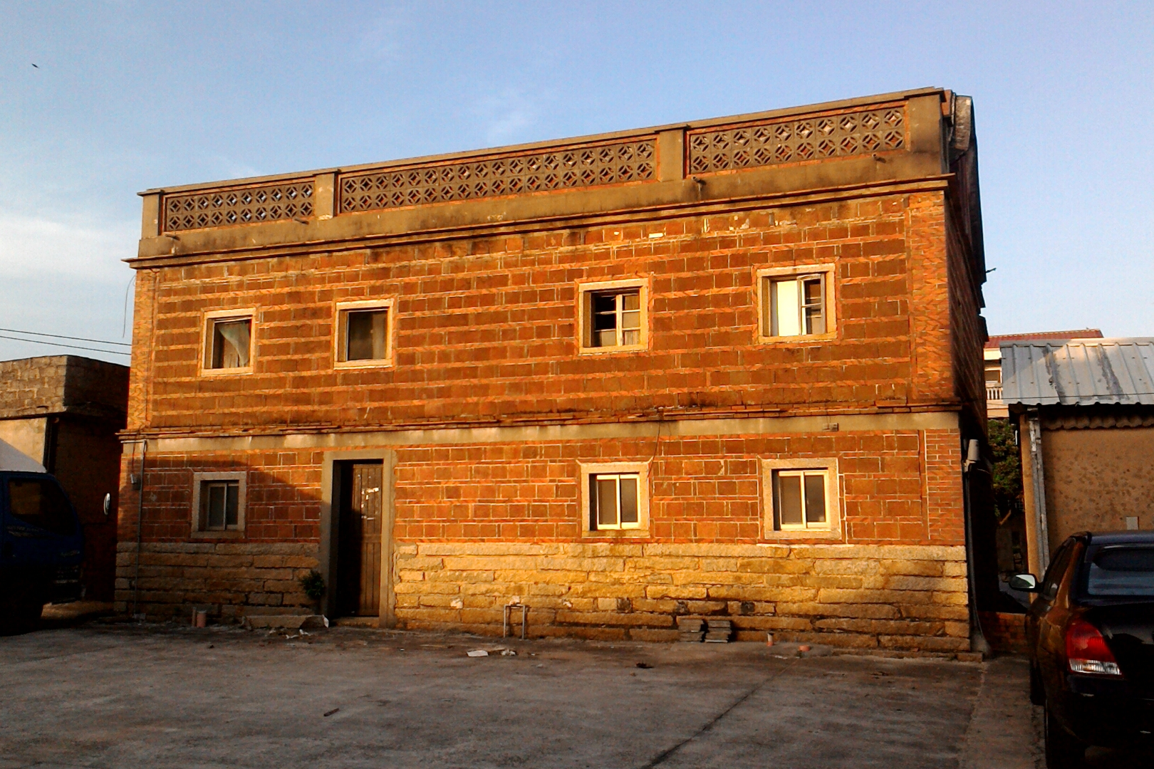 金寧鄉下堡聚落洋樓,福建省金門縣金寧鄉盤山村